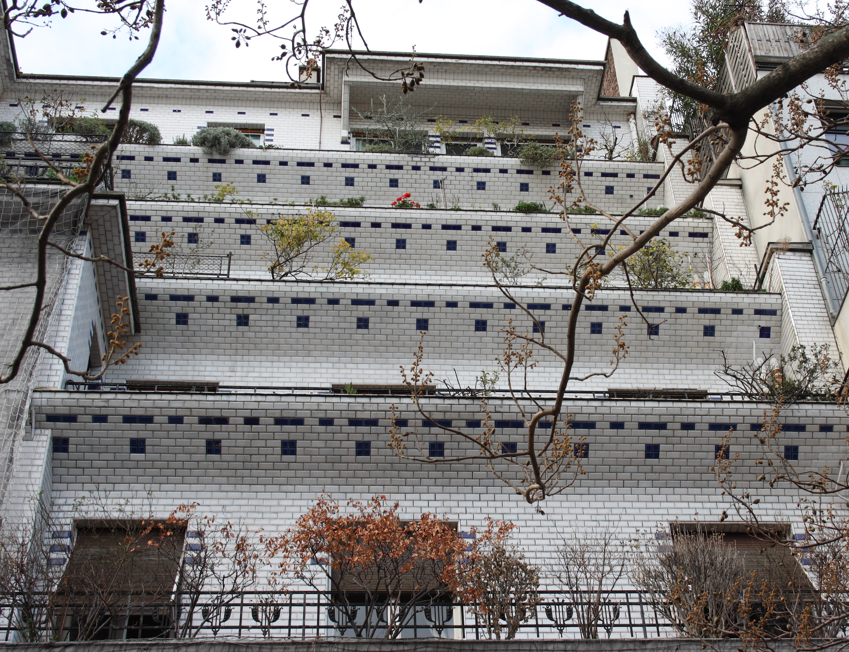 Stufenhaus von Henri Sauvage, 26, rue Vavin im 6. Arrondissement von Paris